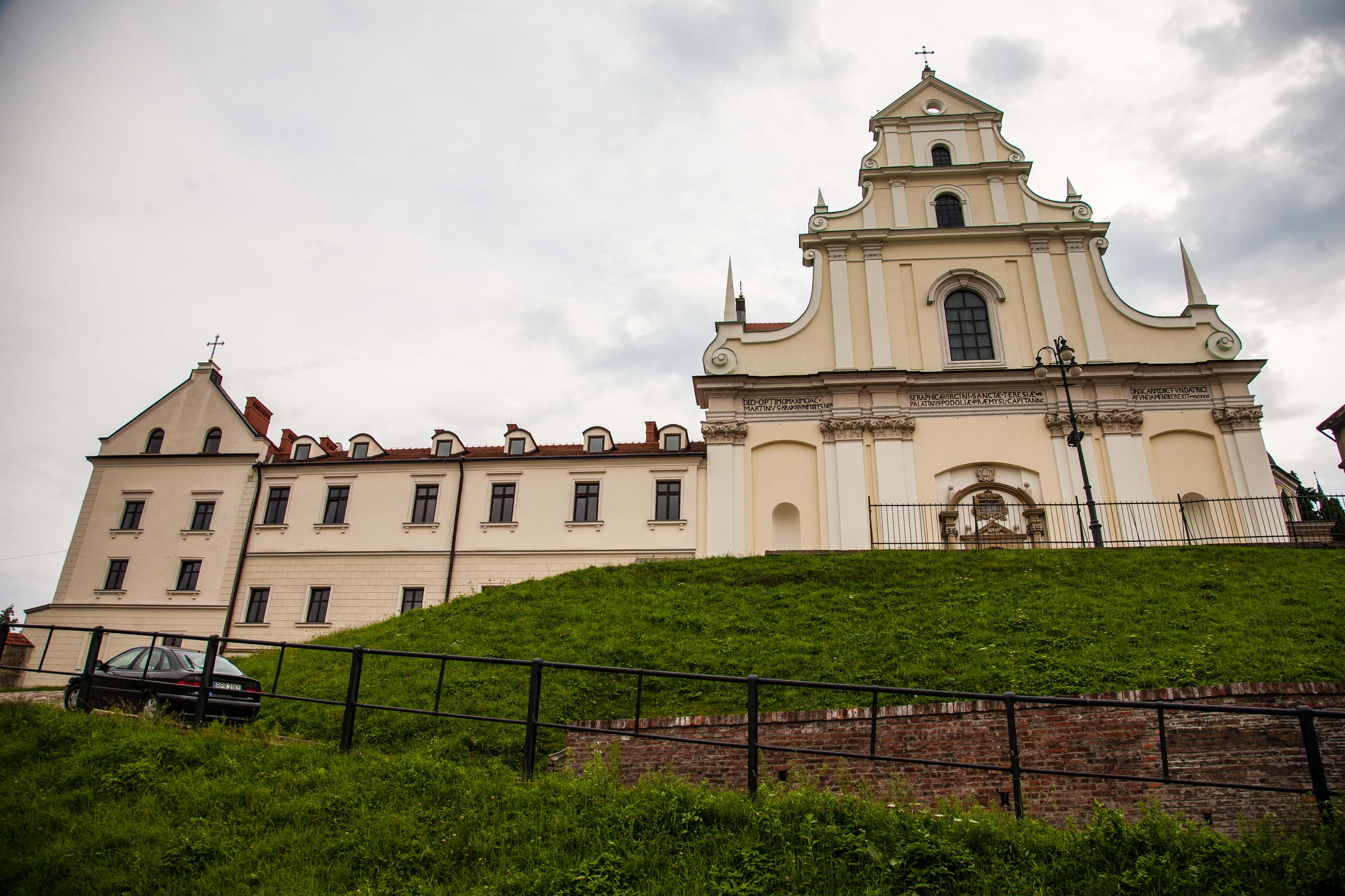 Przemyśl, ul. Karmelicka 1 - kościół p.w. św. Teresy, w zespole klasztornym karmelitów bosych, mur., 1627-1630, 1866, 1996 (zabytek nr A-51 z 23.03.1952)